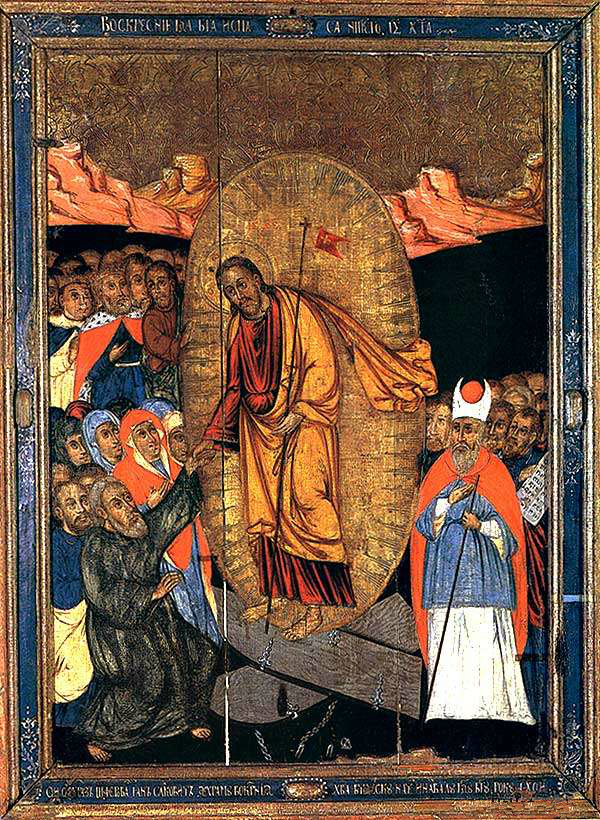 Сашэсце ў пекла. 1678. Дошка, яечная тэмпера. 121х90х2,9-6,5. З Чачэрска Гомельскай вобласці Нацыянальны мастацкі музей